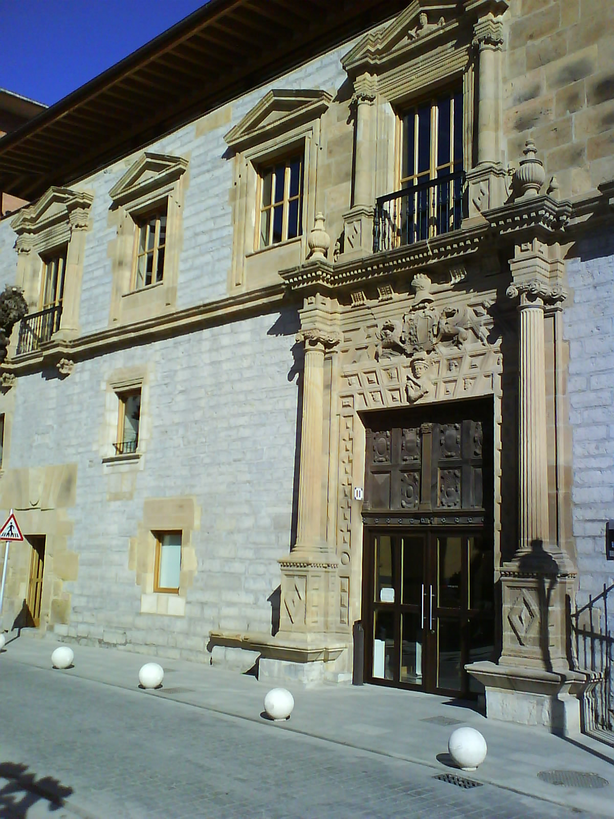 Palacio Lobiano de Ermua, Vizcaya, País Vasco, España.